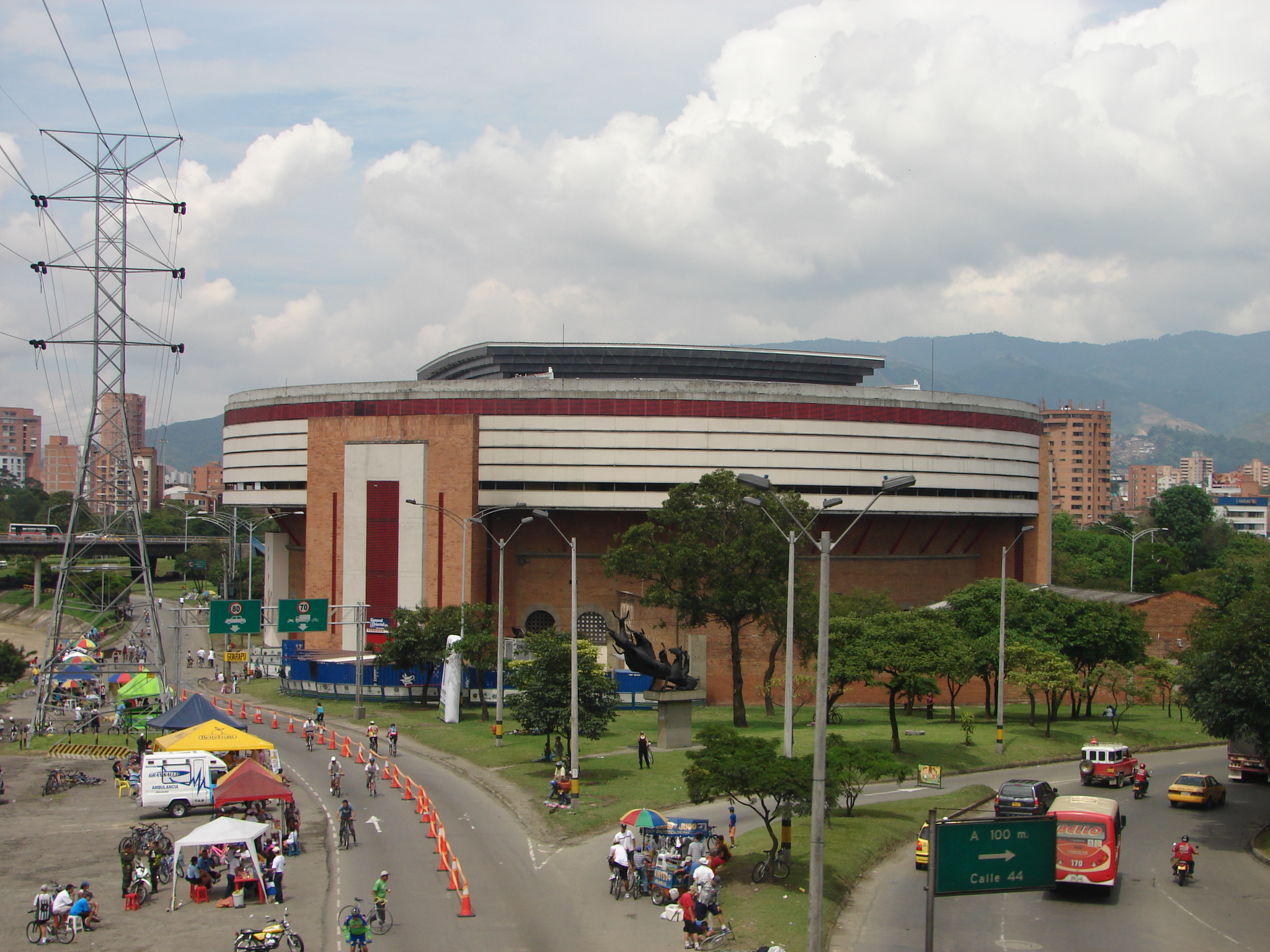 Plaza de Toros la Macarena. Medellín. Colombia.